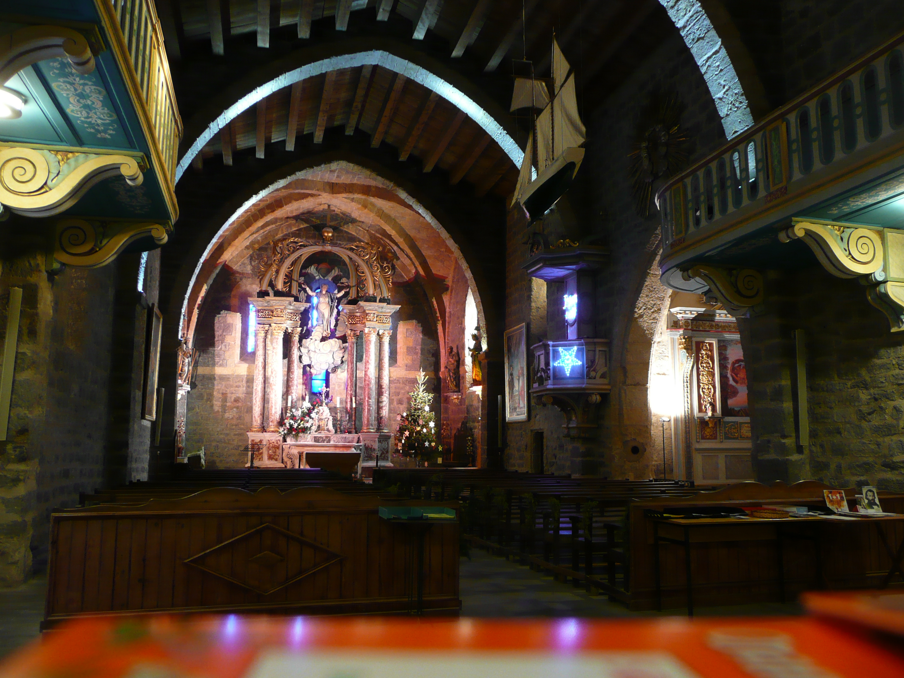 église Notre-Dame de l'Assomption à Gruissan (France)